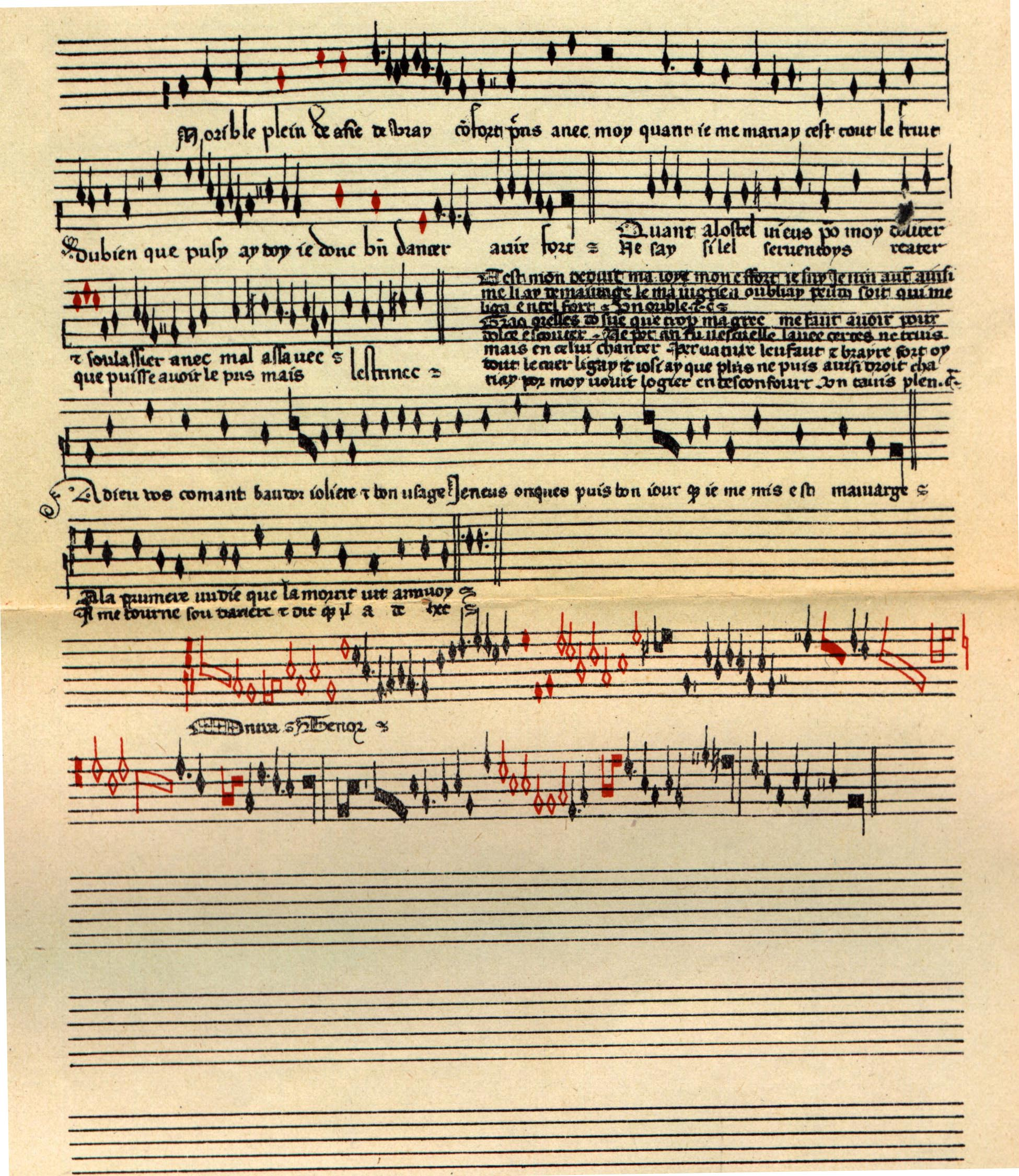 Folio 13v du Codex Chantilly, musée Condé, vers 1400. Virelai anonyme à trois voix Un orible plein/Adieu vos comant